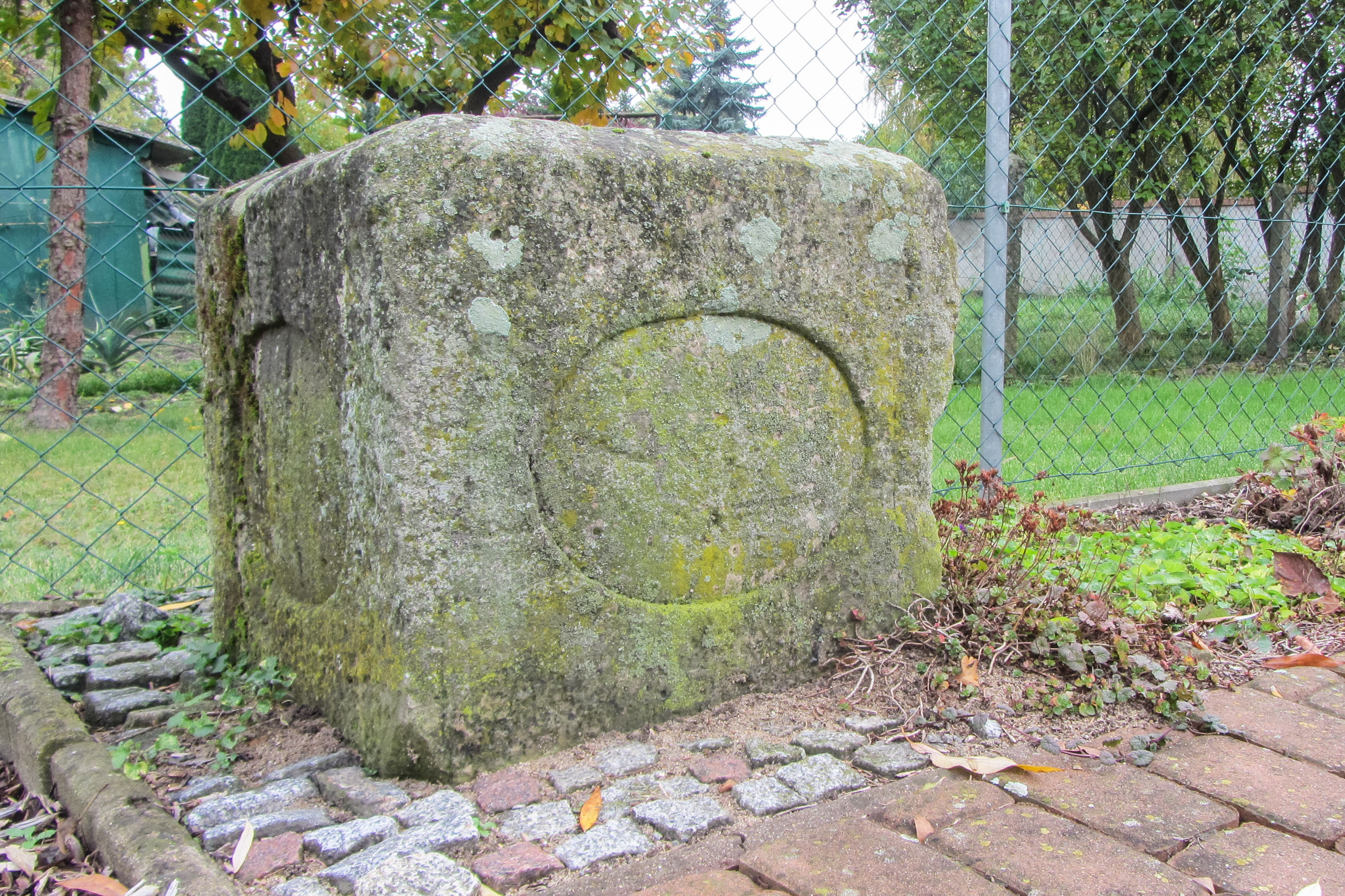 Preußischer Viertelmeilenwürfel (0285) in Dalchau, an der K 1070 in Ortslage